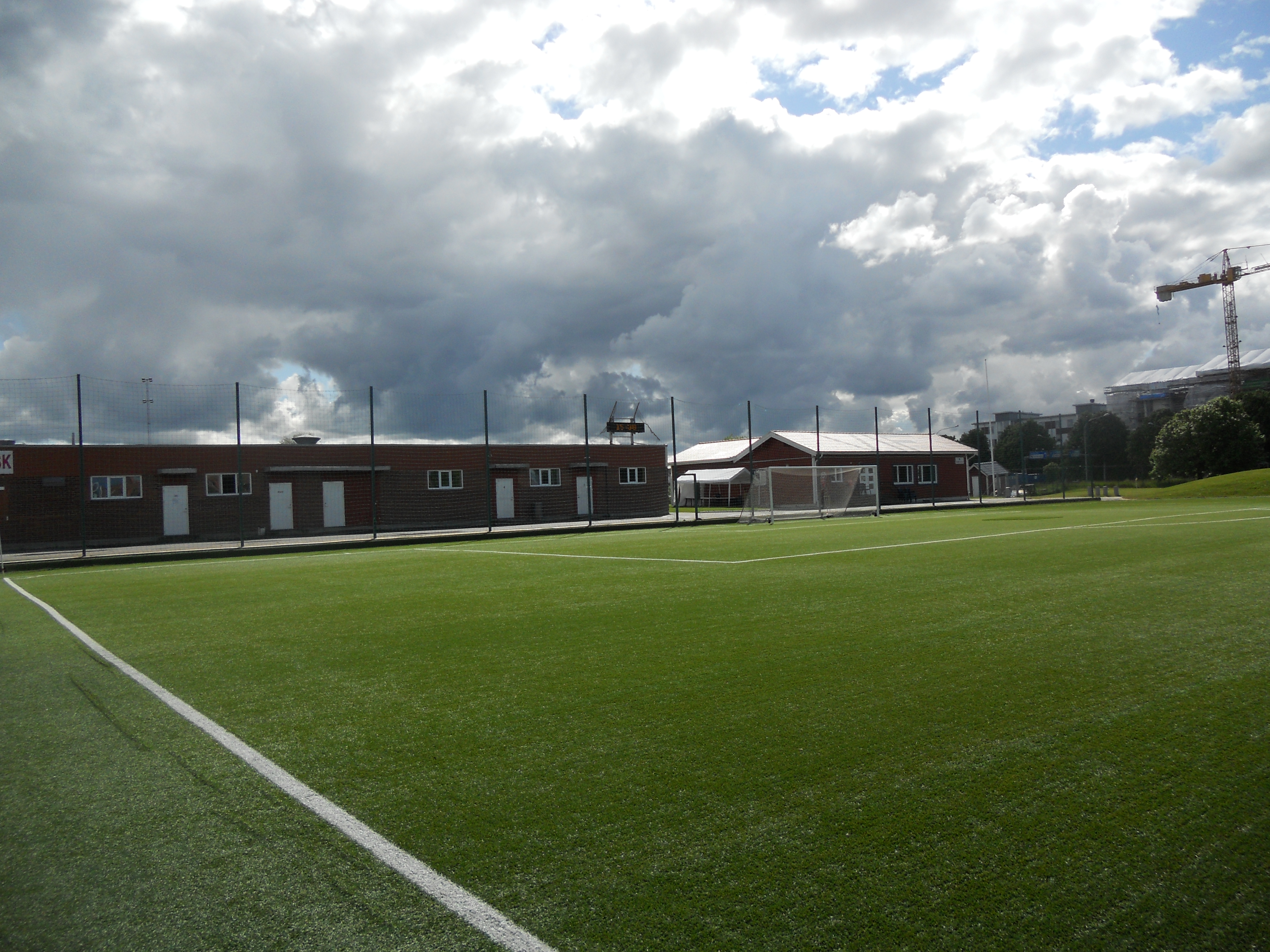 Vänersvallen med omklädningsrum i bakgrunden.